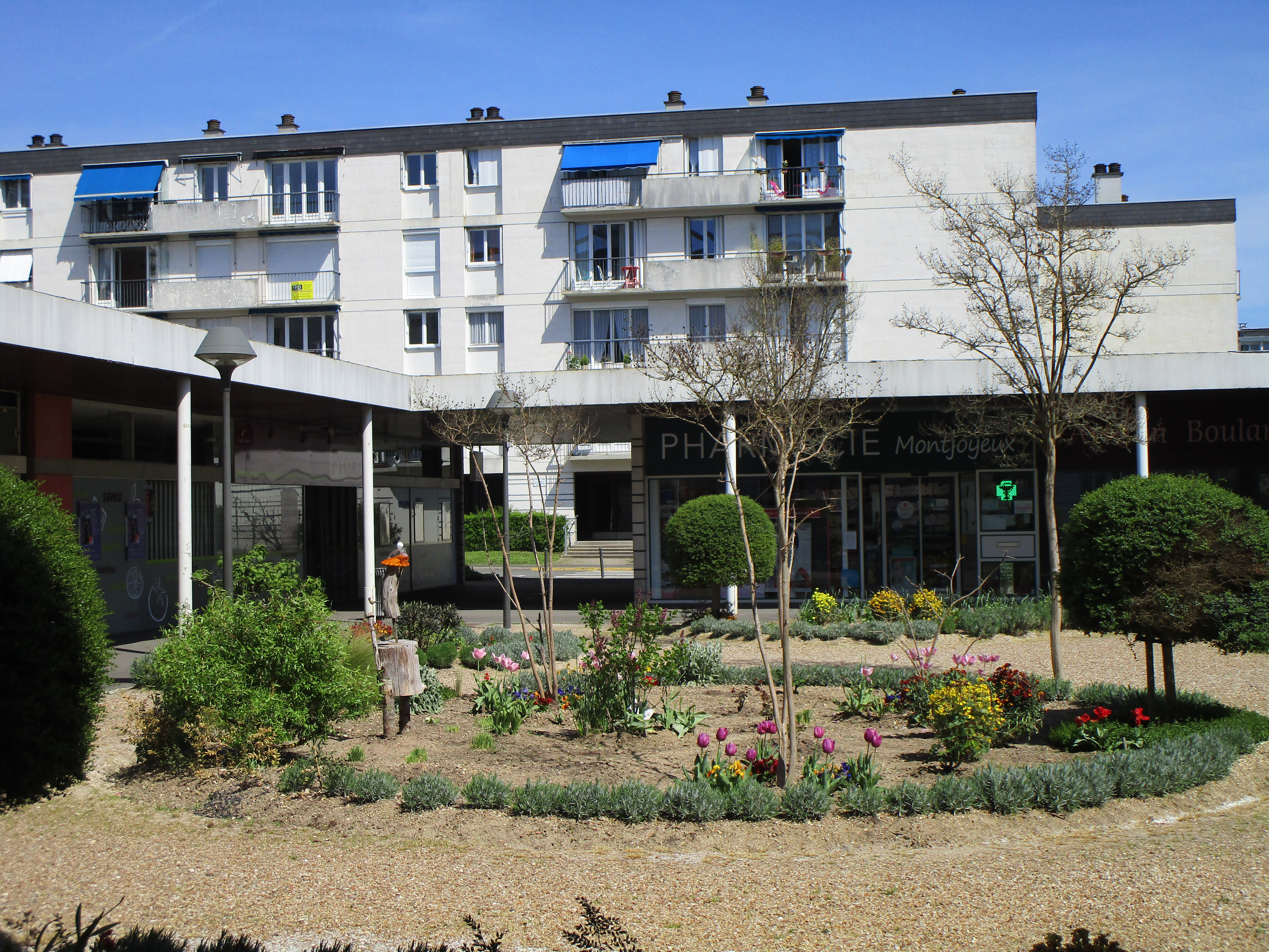 Centre commercial de Montjoyeux à Tours